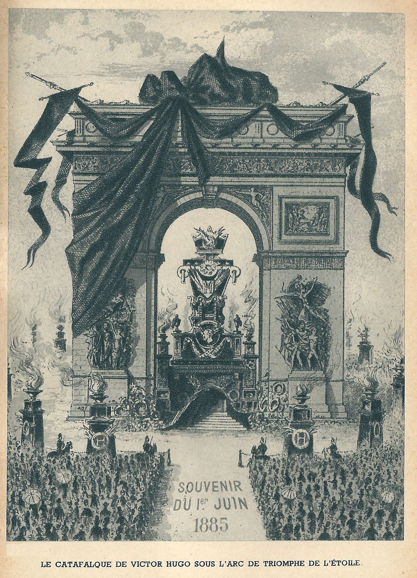 Arc de triomphe de l’Étoile à Paris (Seine, France), catafalque de Victor Hugo le 1er juin 1885.